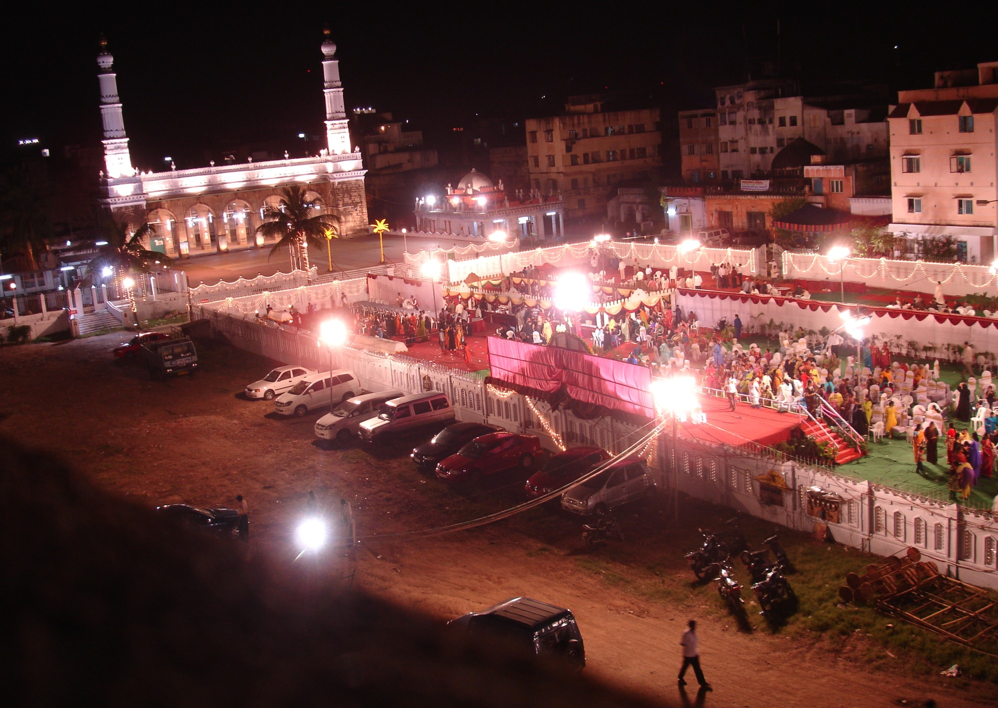 Chennai.in Walaja (Maharajas Wedding)